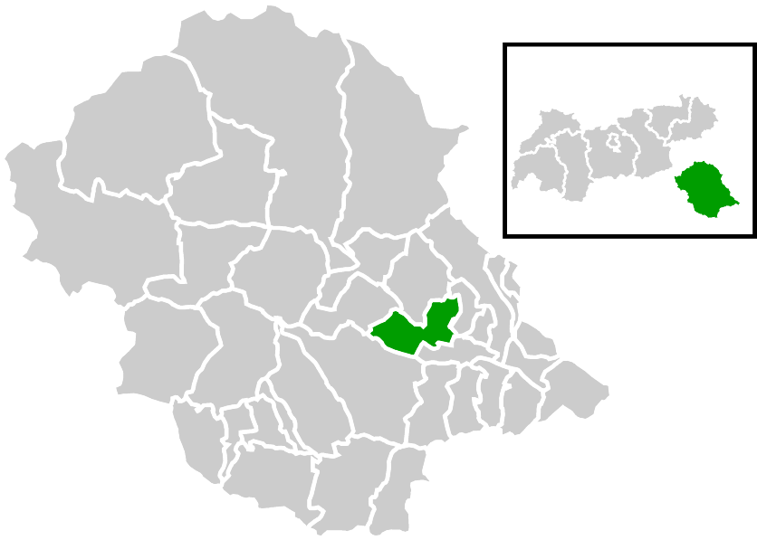 Lage der Gemeinde innerhalb des Bezirks Lienz